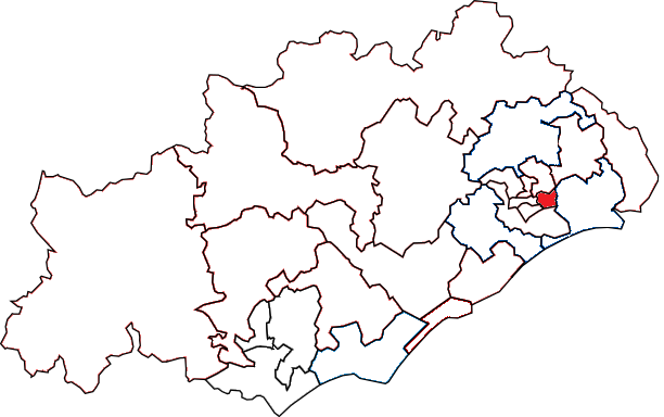 Situation du canton dans le département de l'Hérault